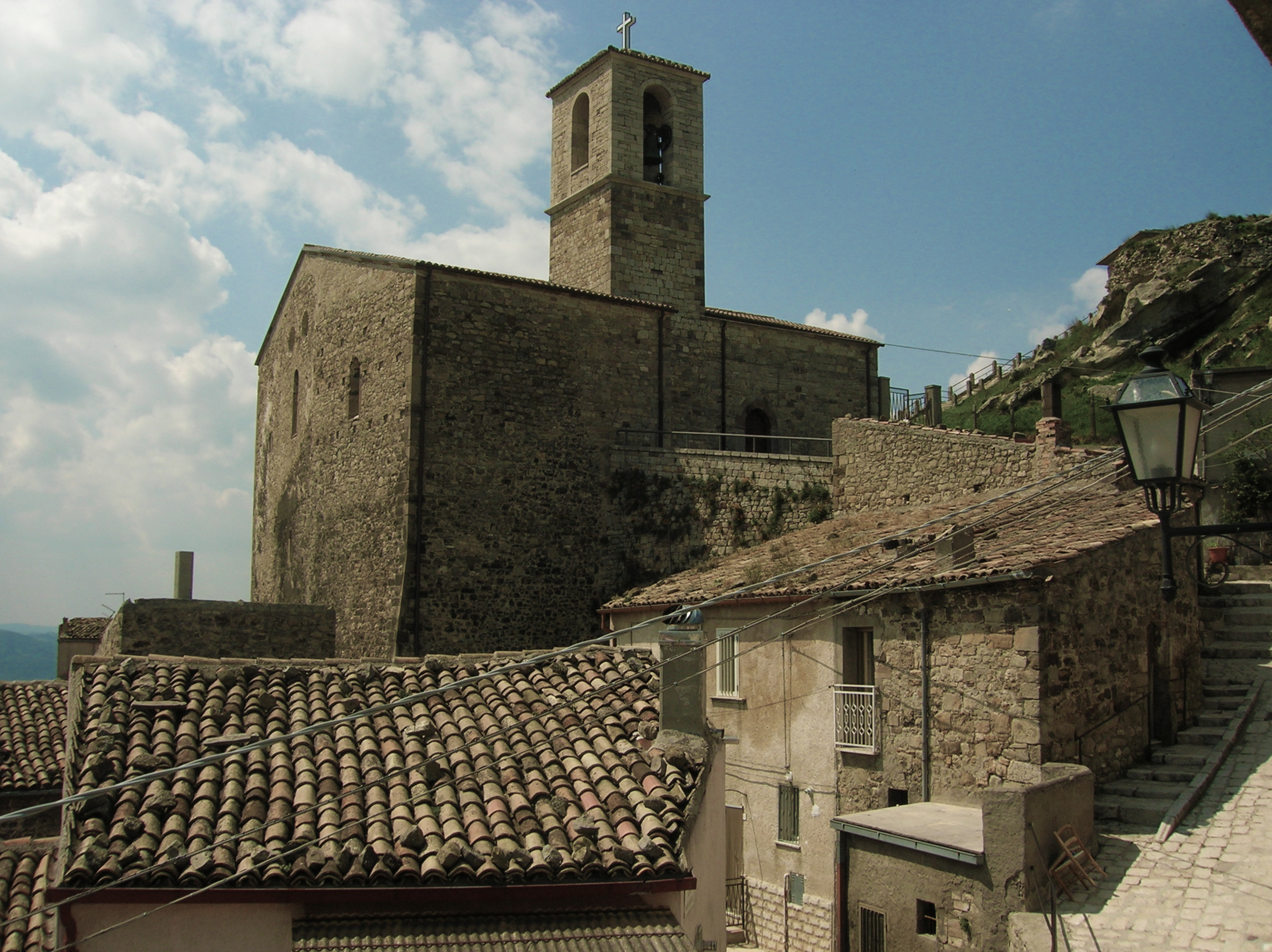 Chiesa di San Giacomo This is a photo of a monument which is part of cultural heritage of Italy.